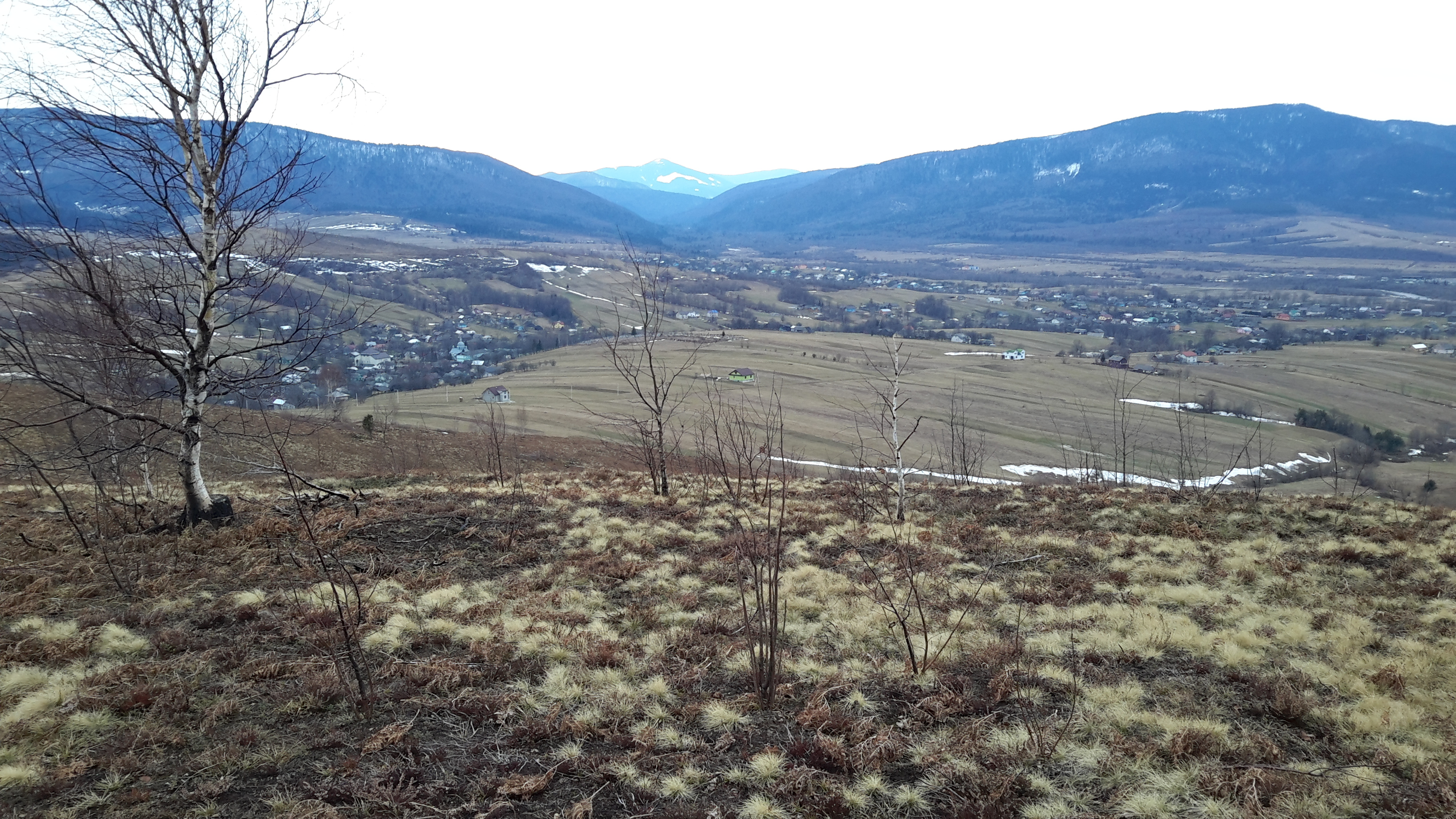 с. Лолин, Долинський р-н, Івано-Франківська обл.